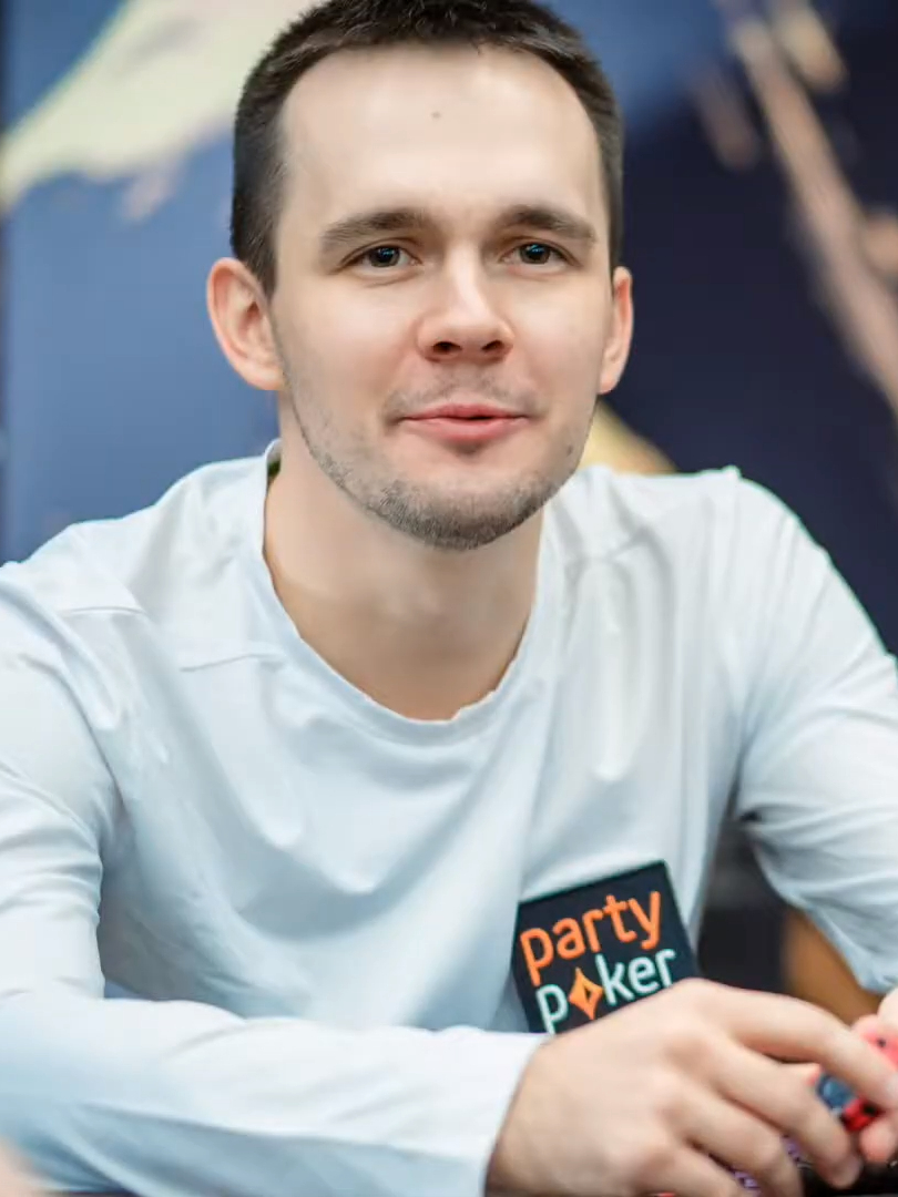 Mikita Badziakouski bei der partypoker Live Millions Super High Roller Series